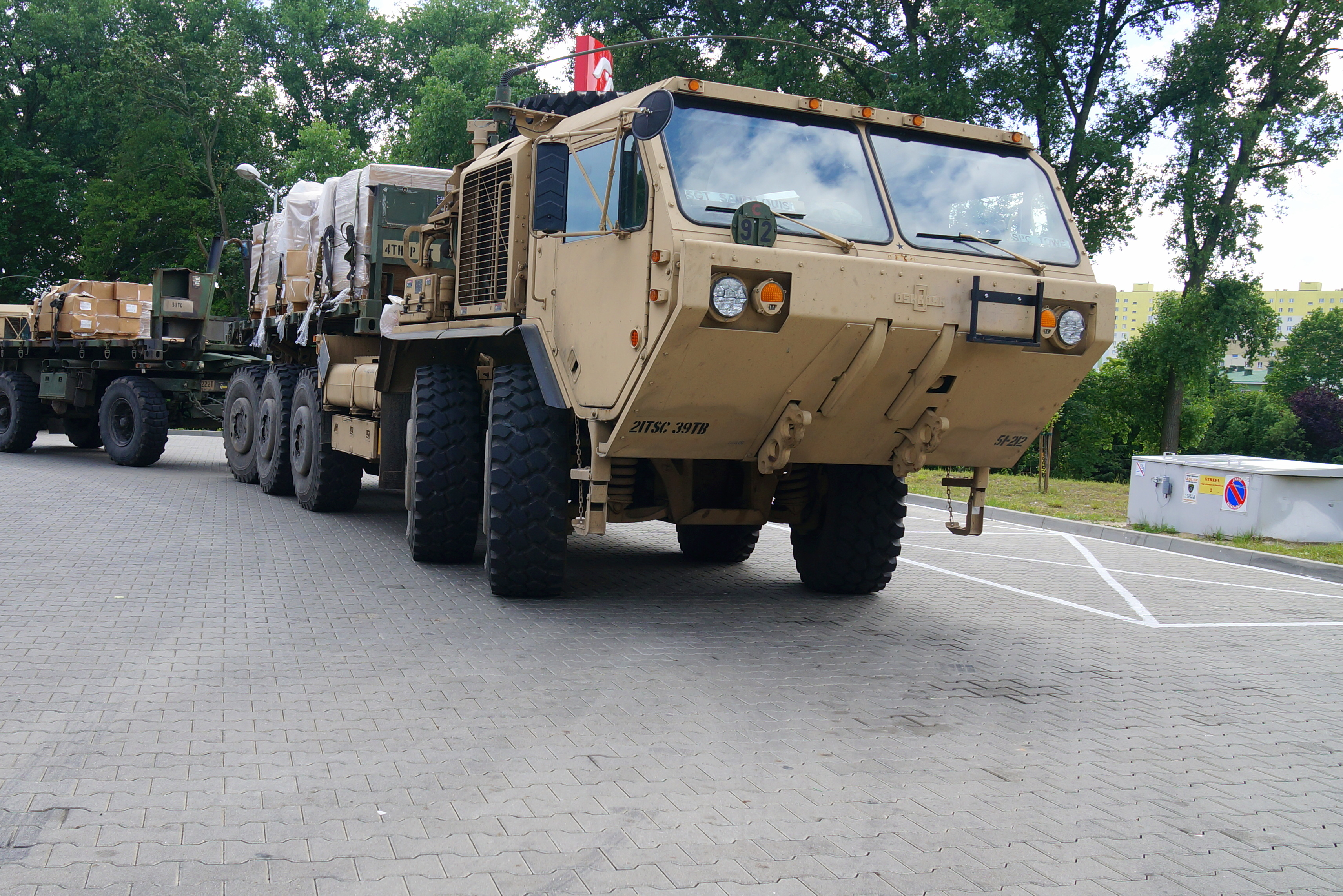 Manewry "Anakonda-16" - ciężki wojskowy samochód ciężarowy Oshkosh PLS armii amerykańskiej w Gorzowie Wlkp.